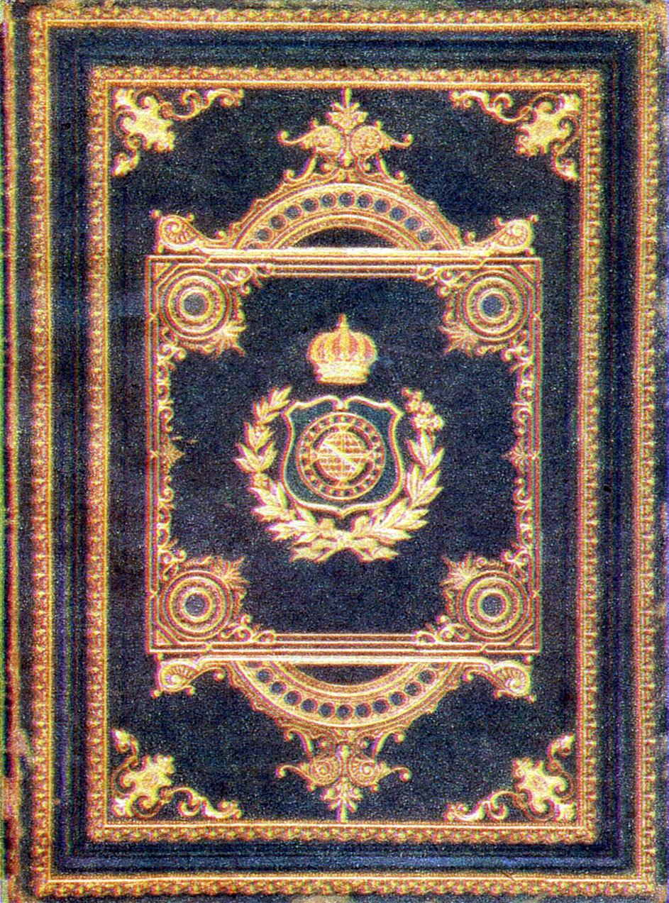 capa decorada da Constituição Política do Império do Brasil 1824.